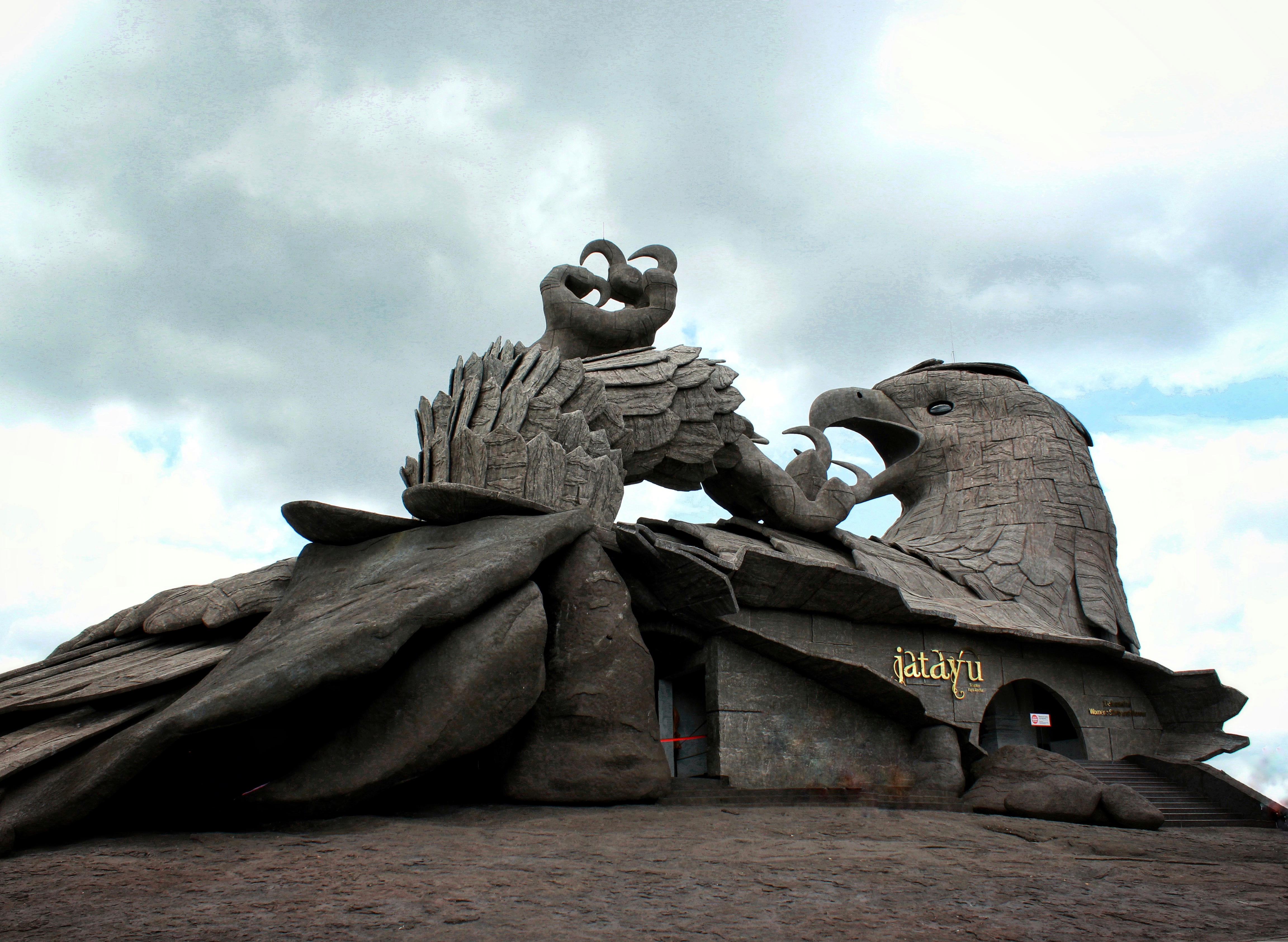 Jaṭāyū sculpture in Jaṭāyū Nature Park, Kerala, India